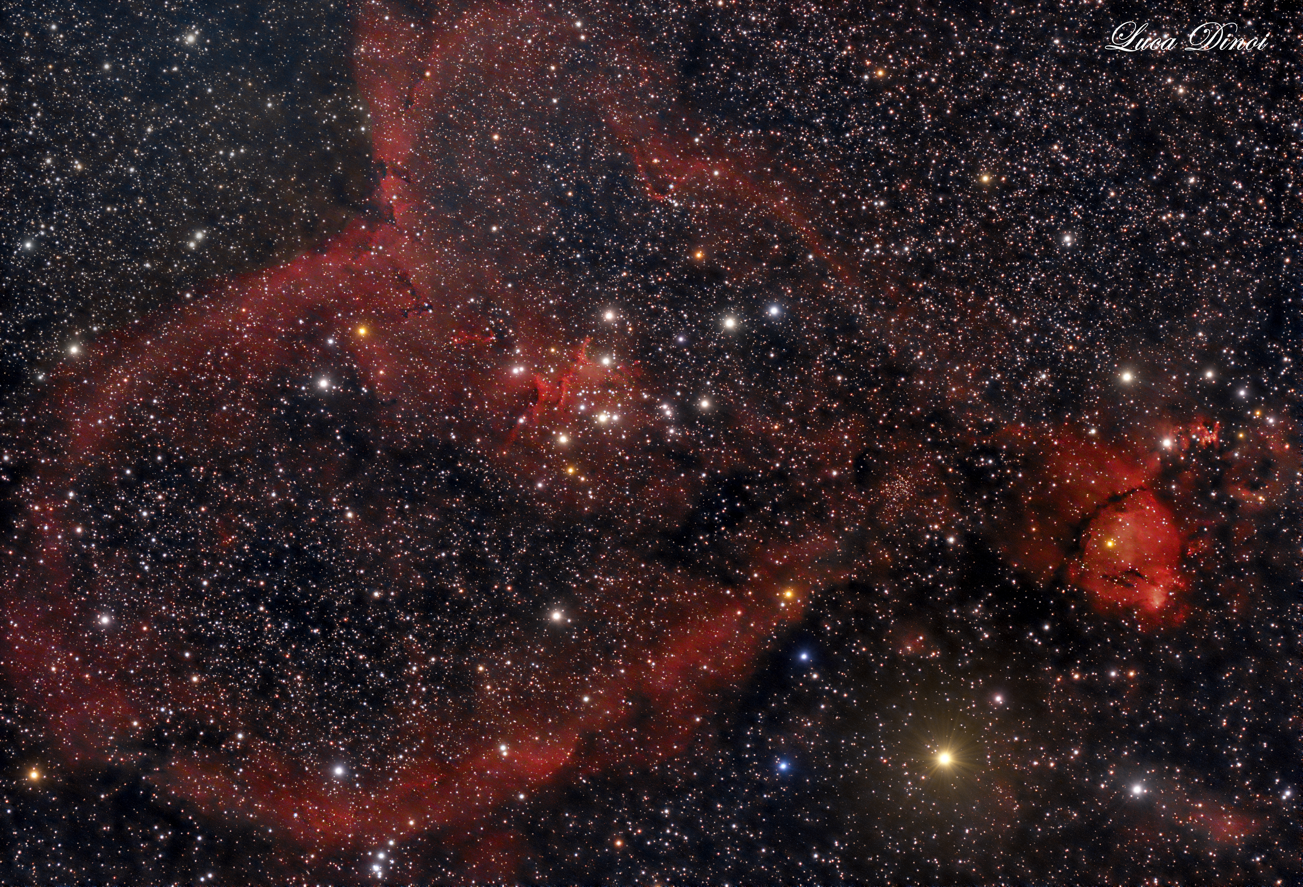 Questa immagine pur essendo realizzata con scatti a lunga posa, le stelle risultano essere puntiformi grazie all'azione di una montatura equatoriale che permette l'inseguimento stellare.